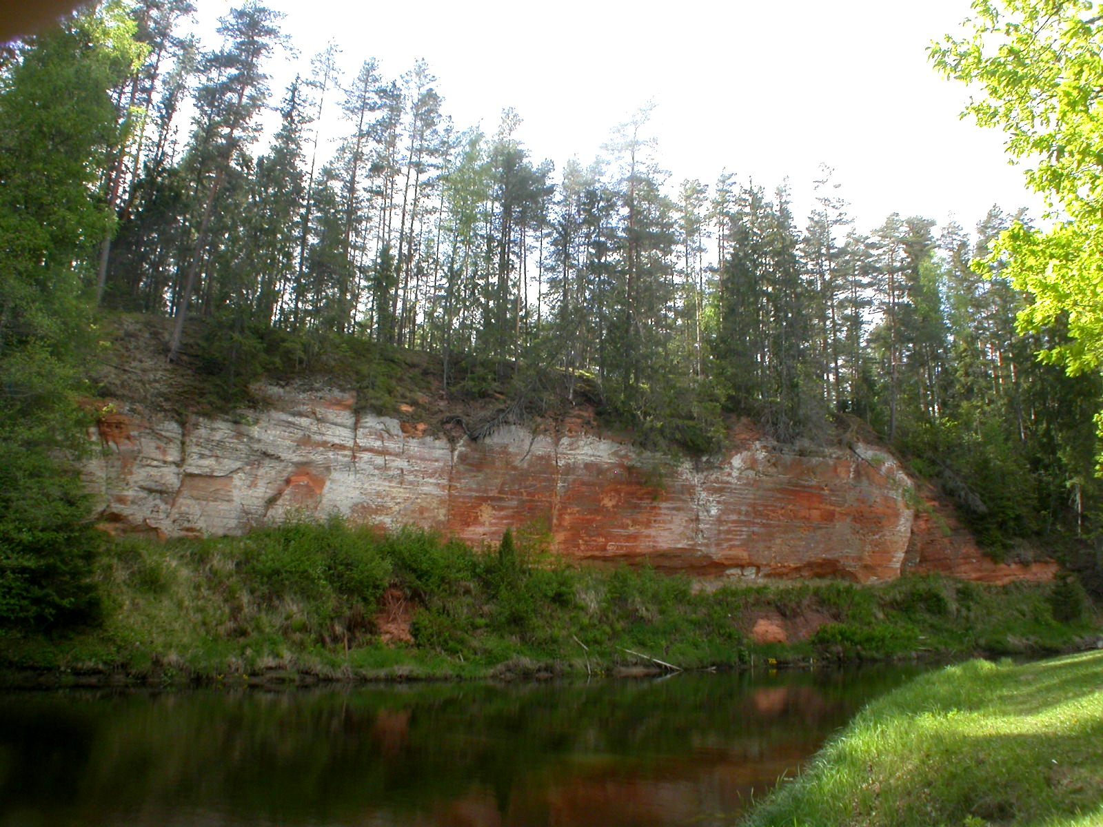 Skaņaiskalns. (Ievas Upenieces foto)